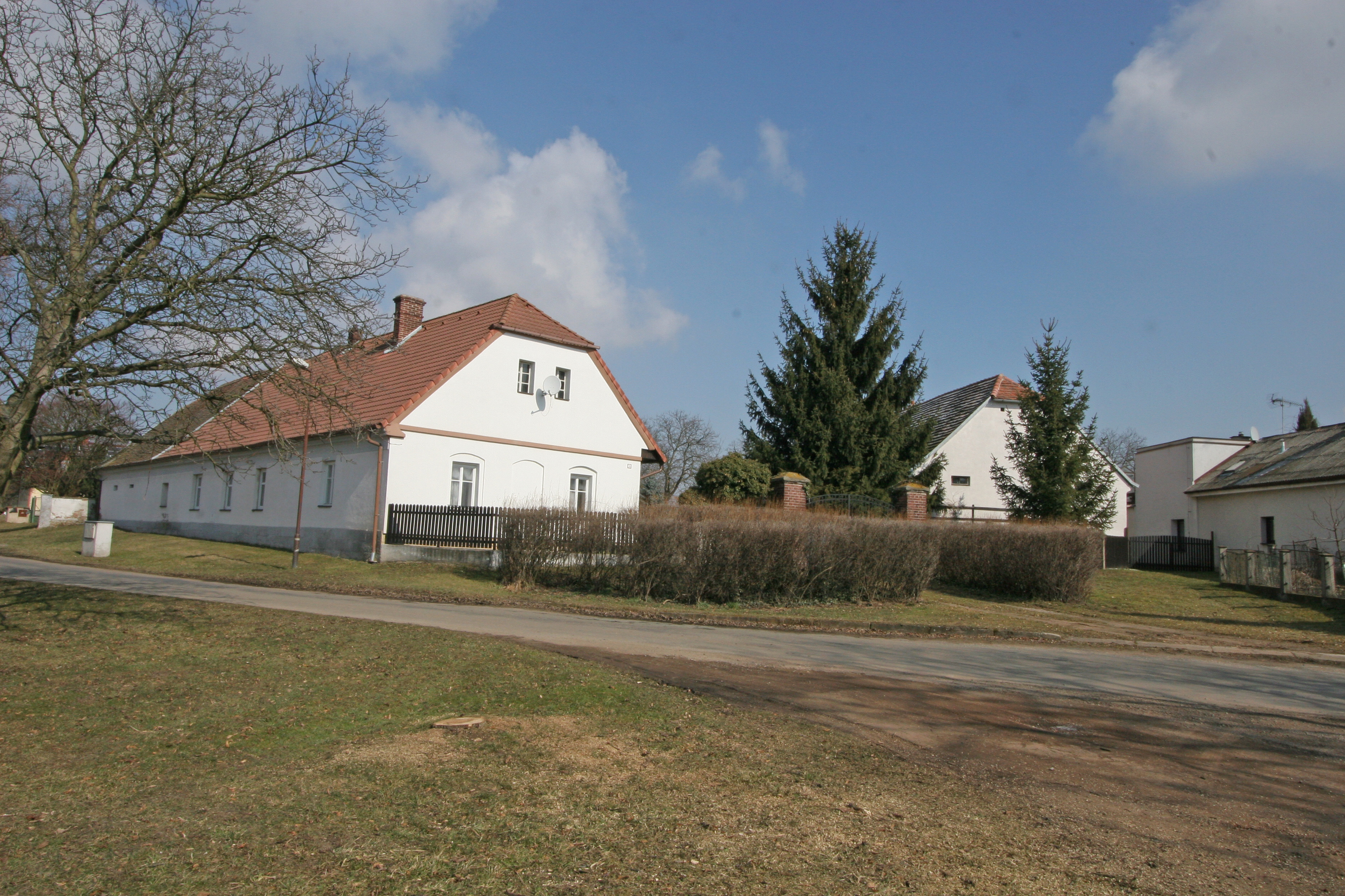 Vlčkovice čp. 12